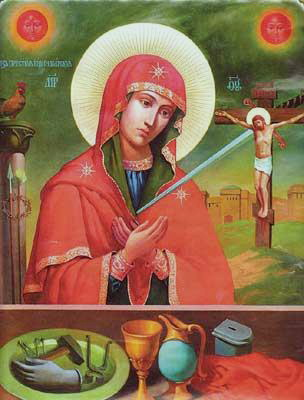 Самарская икона Божьей матери. (Из Владимирской области)